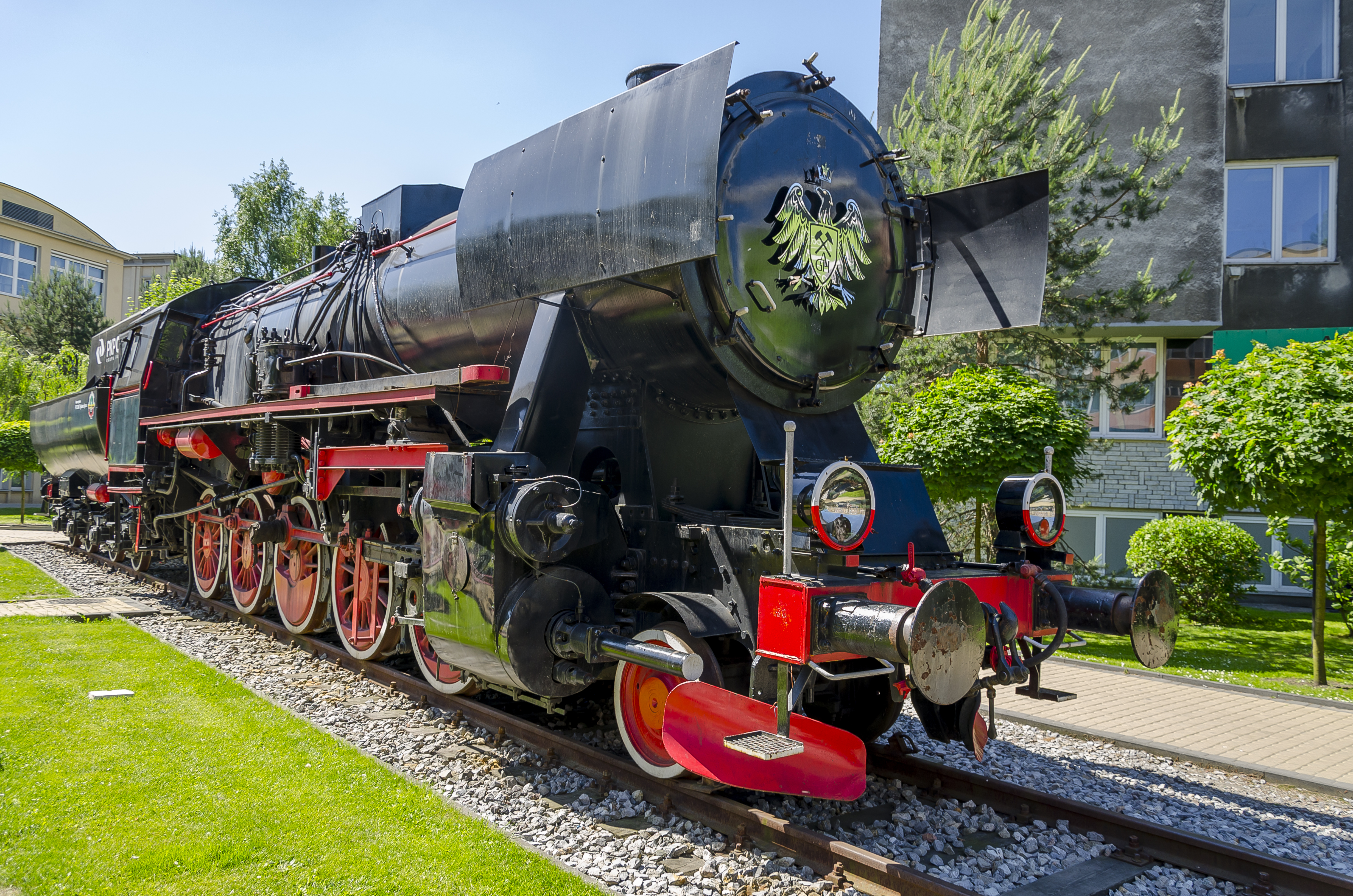 Krowodrza, Kraków, Poland